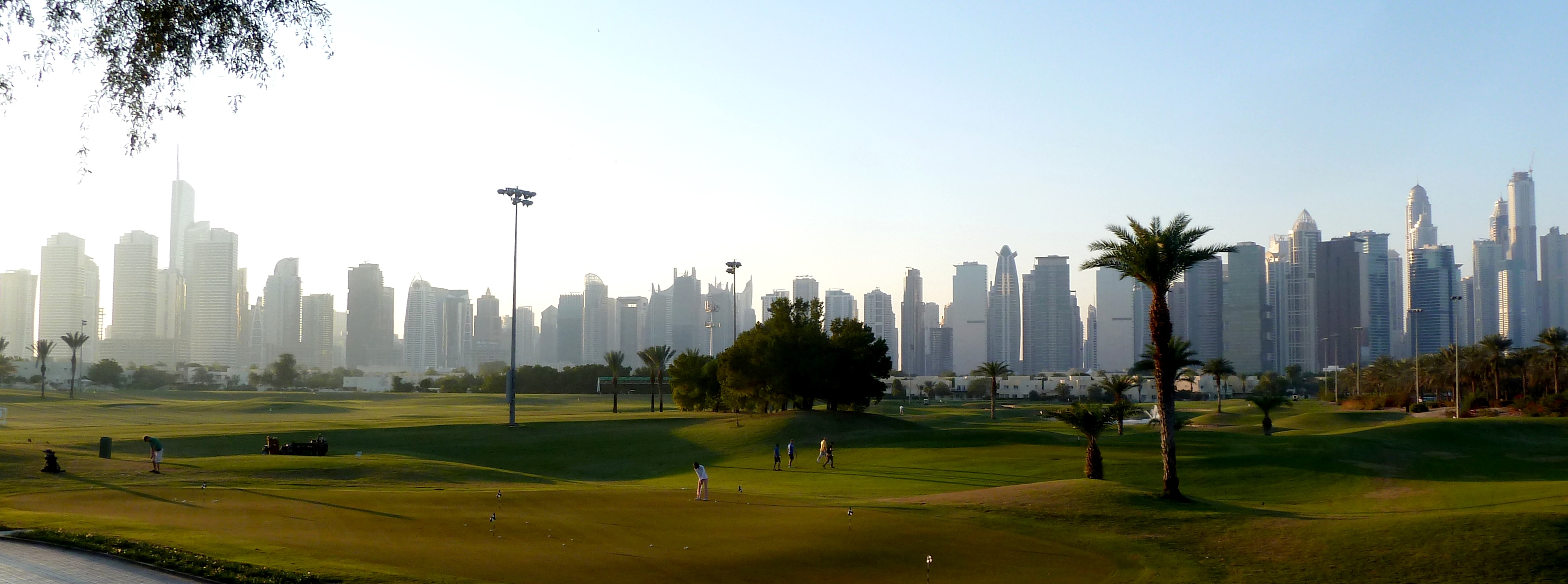 Dubai – Marina --- دبي – مارينا --- Golf - Emirates Hills 2 --- جولف - تلال الإمارات 2